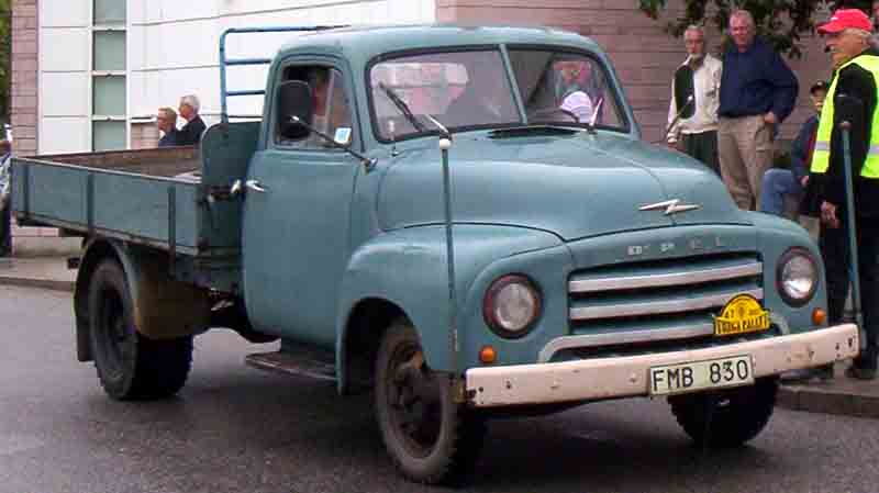 Opel Blitz Truck 1959